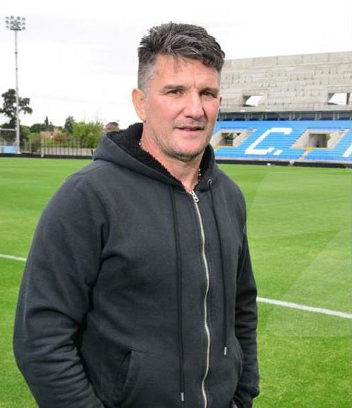 foto de luis fabian artime 2020